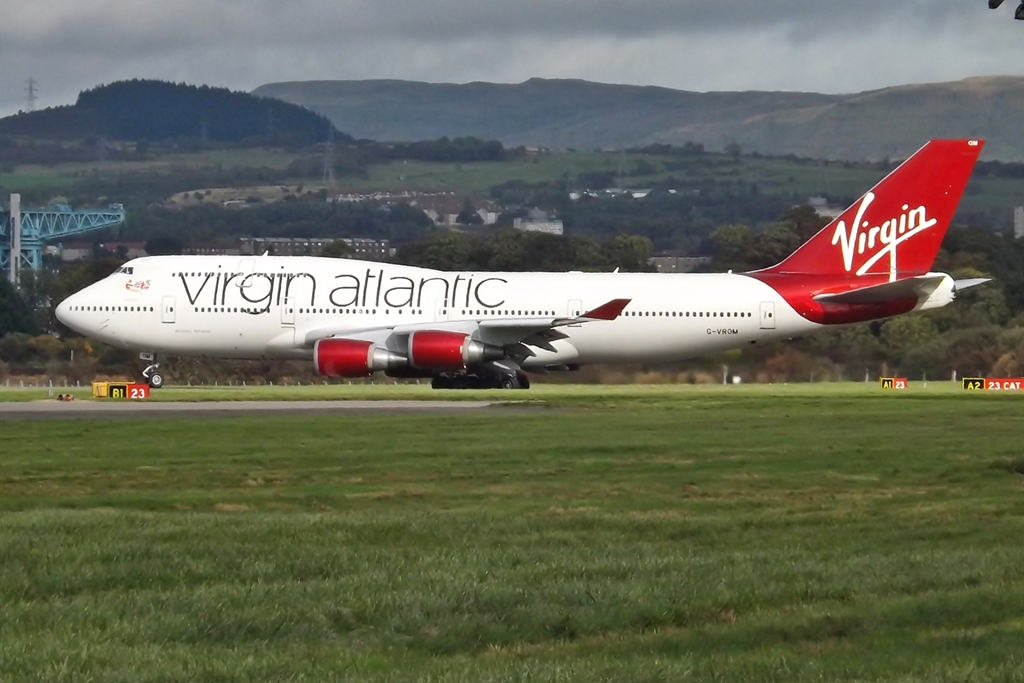 G-VROM Boeing 747-400 Virgin Atlantic